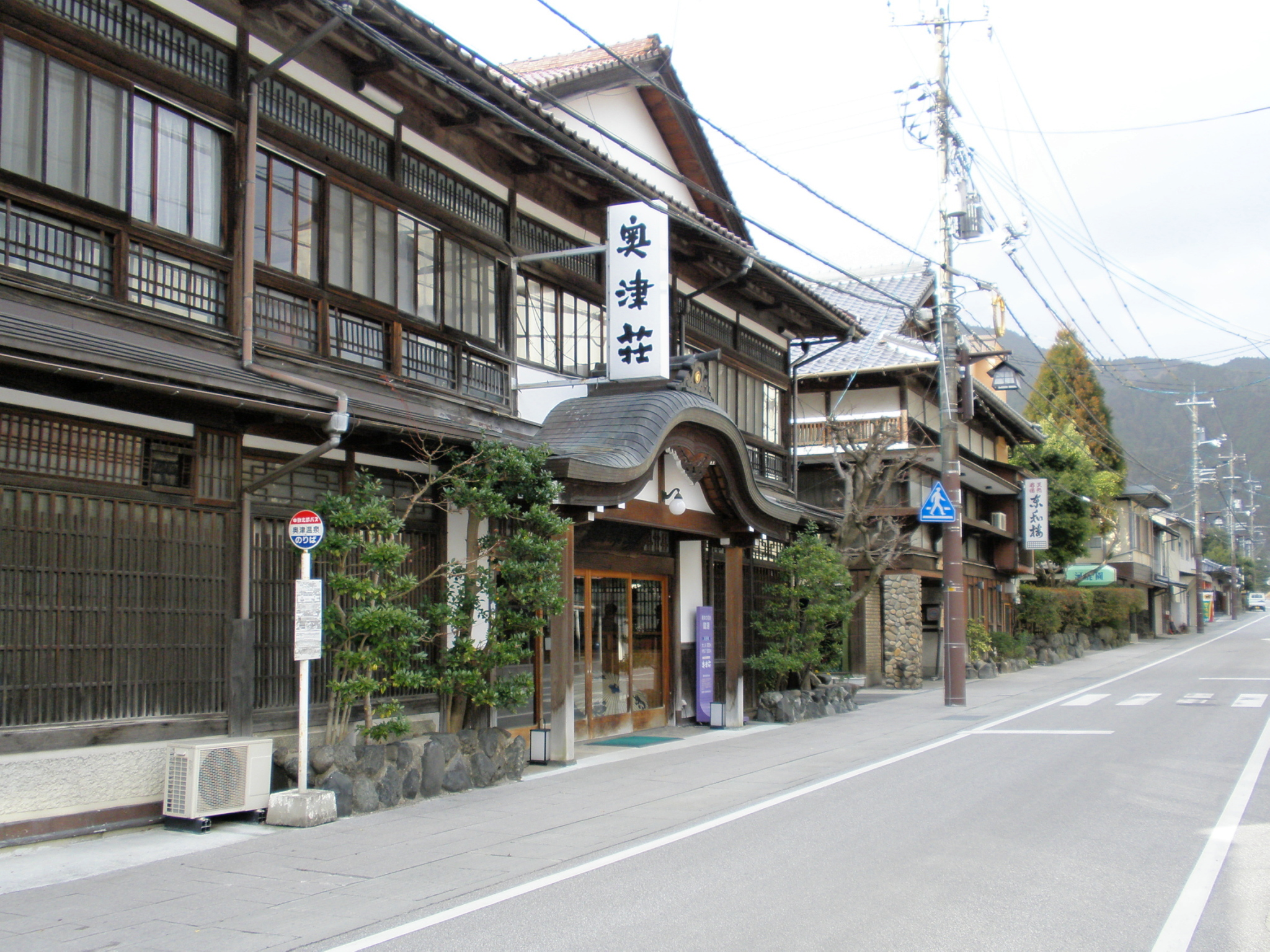 奥津温泉 奥津荘 東和楼